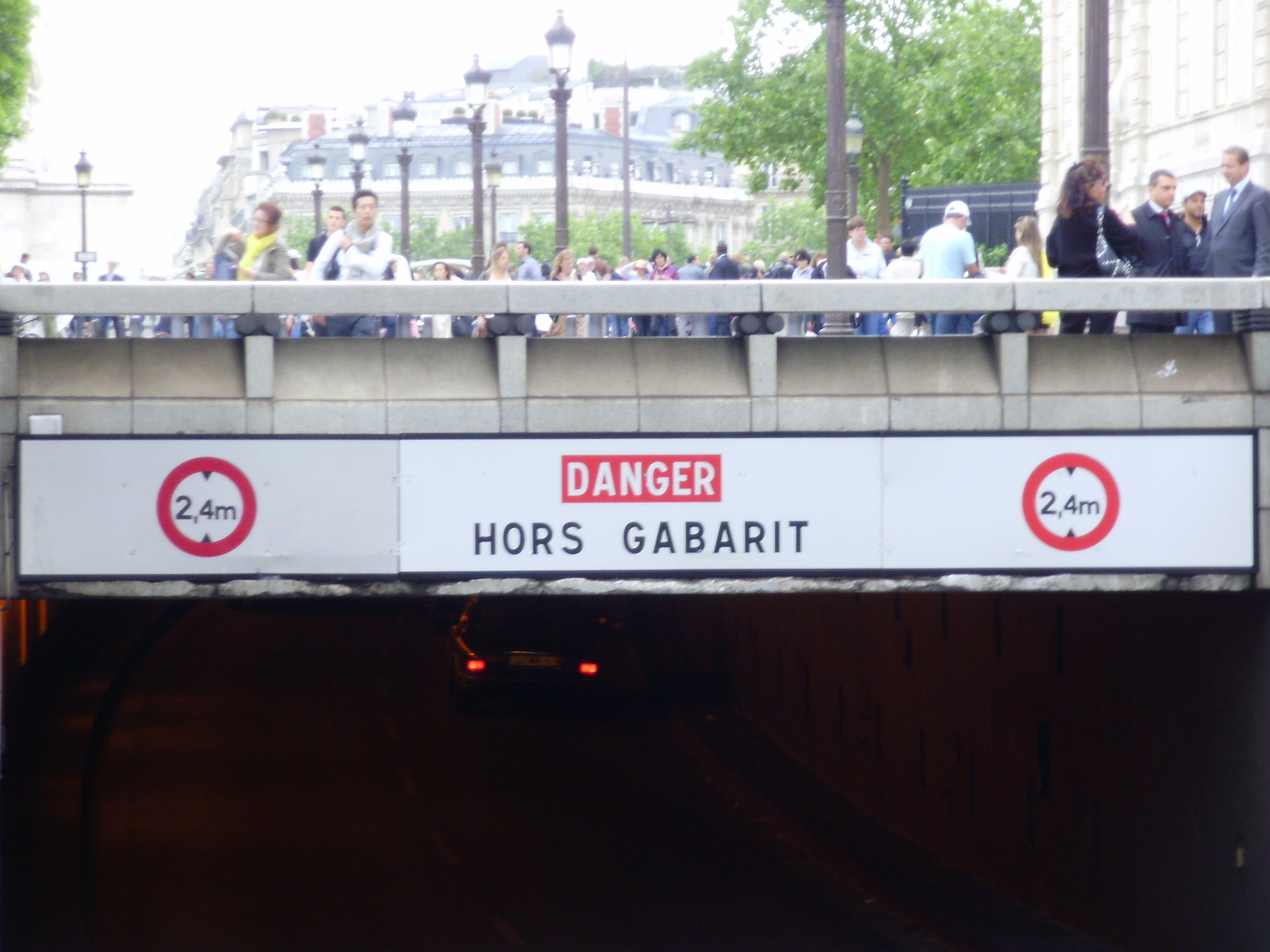 Tunnel de l'Étoile, à Paris (8e), France : panneau de danger, en raison de son gabarit réduit en hauteur, accroché au-dessus de l'entrée du tunnel reliant l'avenue des Champs-Élysées (8e) à l'avenue de la Grande-Armée (17e), en passant sous la place Charles-de-Gaulle et l'arc de triomphe de l'Étoile.